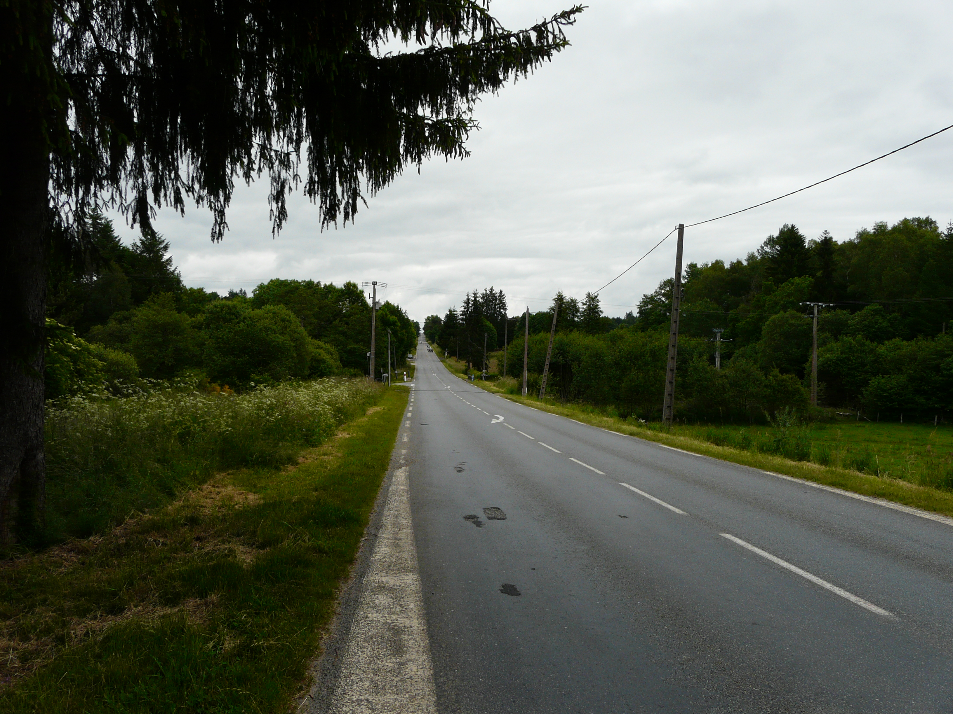 La route départementale D1089 (ancienne route nationale 89) à Chalons, commune d'Aix, Corrèze, France.